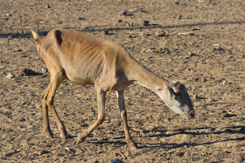 Cabra emagrecida na pior seca dos últimos 50 anos no semiárido brasileiro, foto tirada em Petrolina.